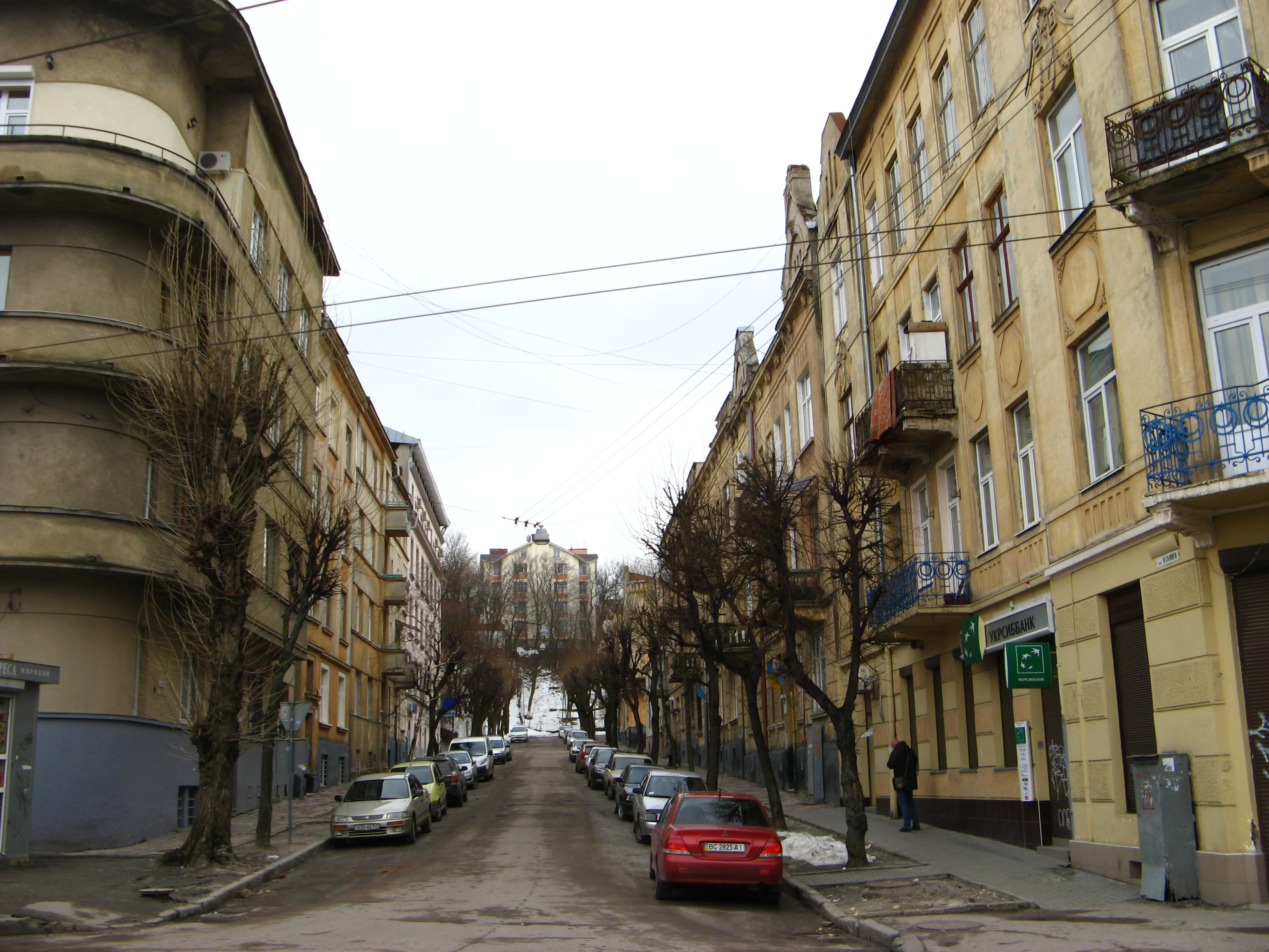 Йосипа Сліпого вул. (Львів)